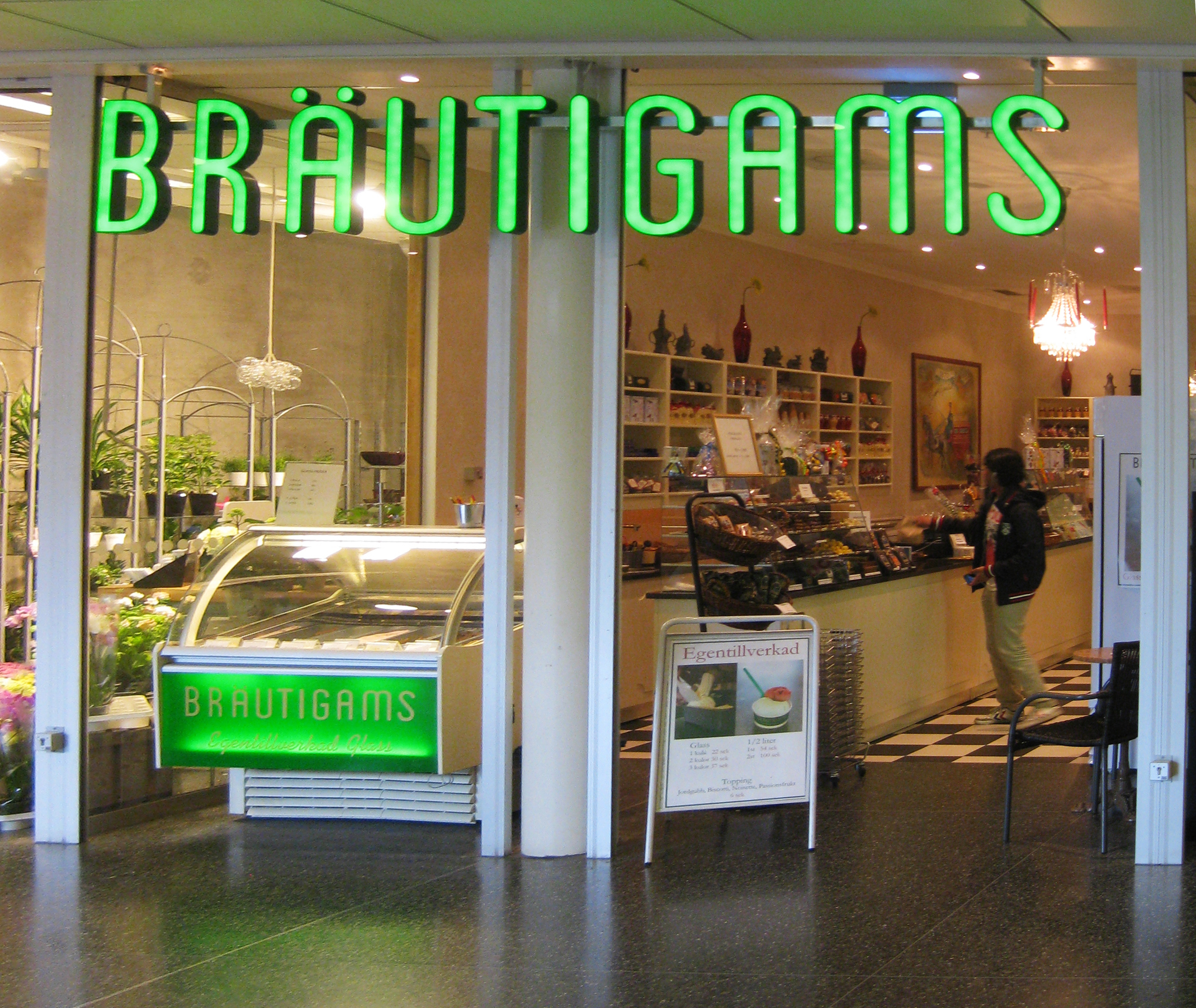 Bräutigams butik på Frölunda torg